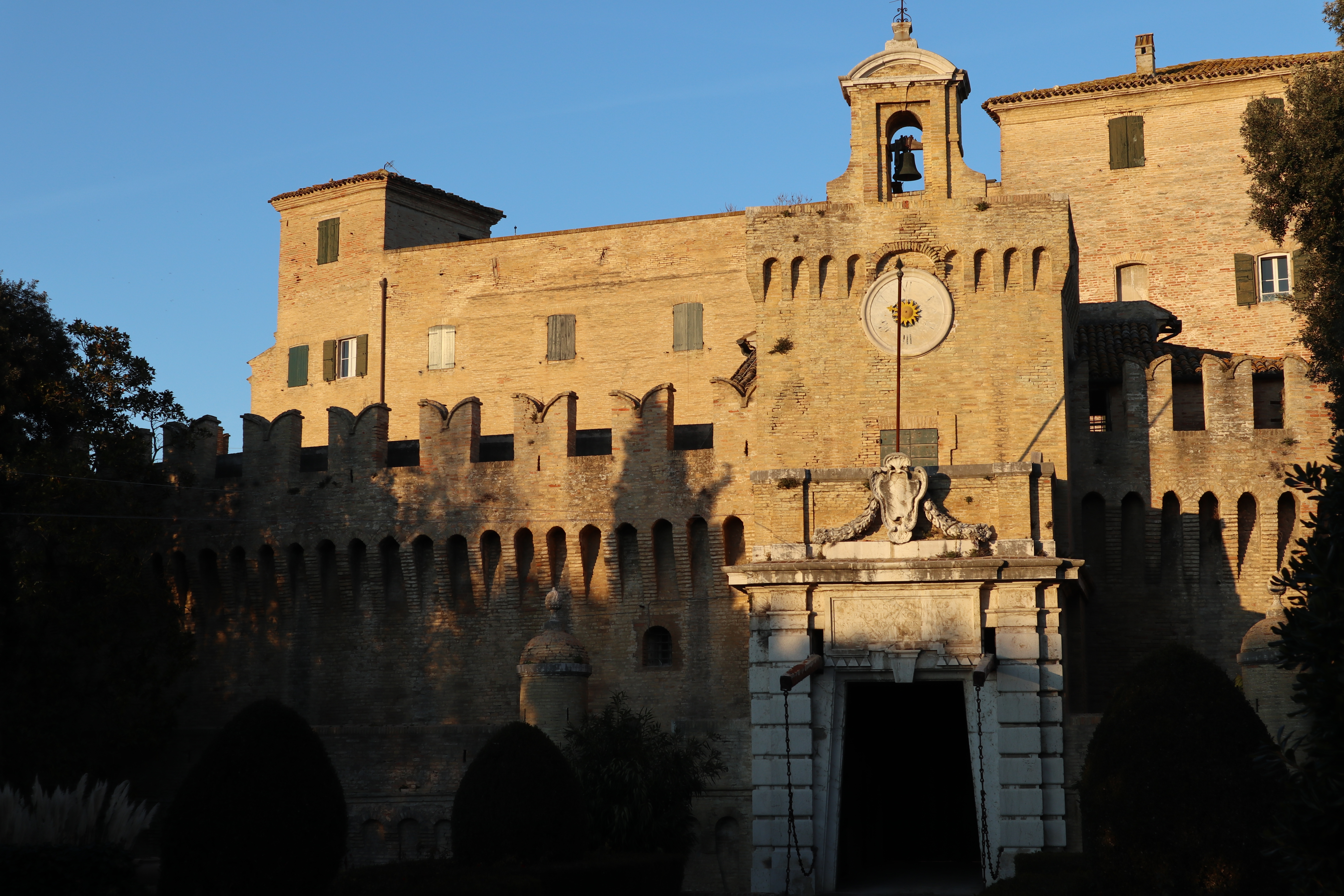 Eretto dagli jesini a partire dal 1194, in seguito conteso con Ancona e infine trasformato in dimora signorile dai marchesi Trionfi a partire dal 1757.